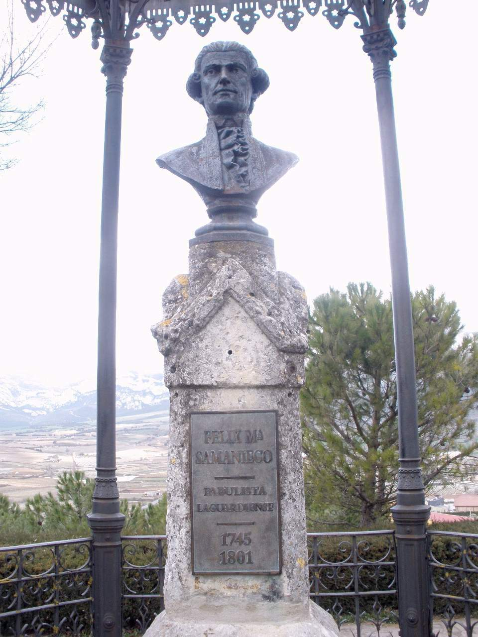 Laguardia (Álava)